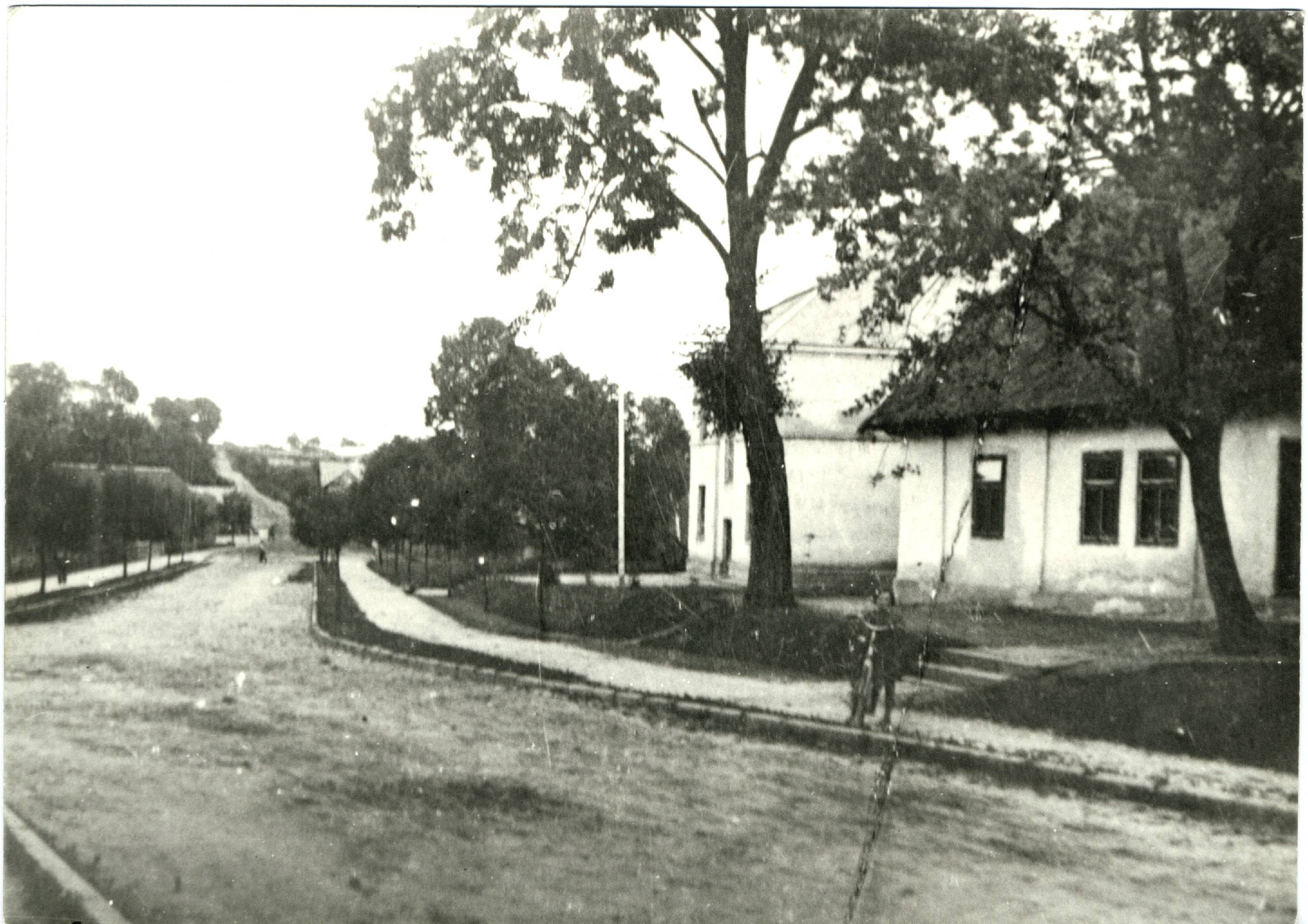 Truskolasy - nieistniejący budynek szkoły